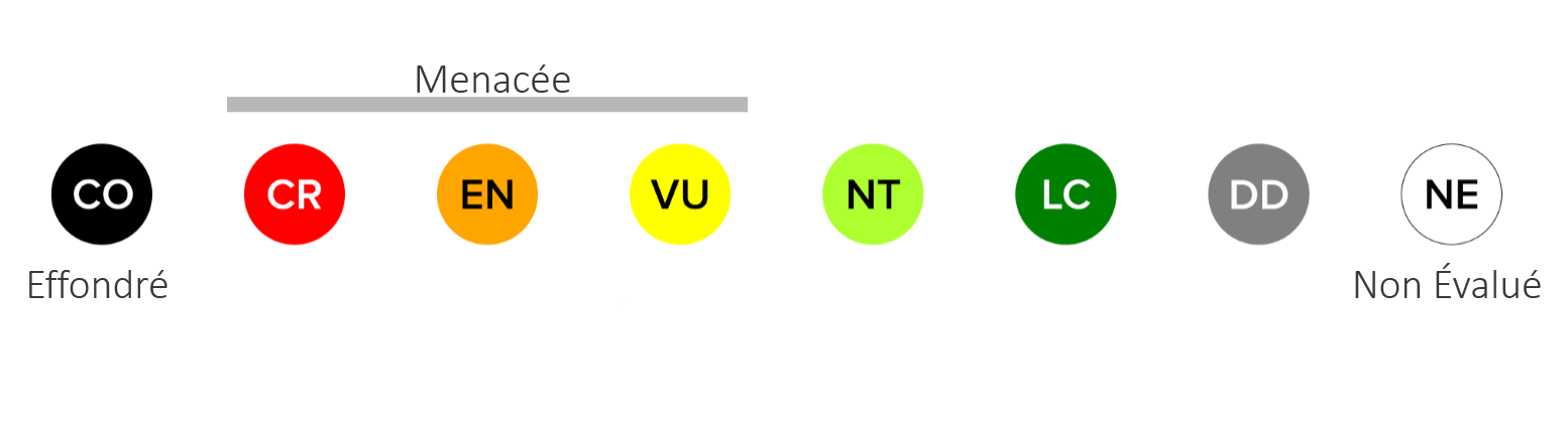 Couleurs de l'état de conservation, selon la classification attribuée par la version actuelle de la Liste Rouge des Écosystèmes préparée par l'UICN. Catégories attribuées par la version actuelle de la Liste Rouge des Écosystèmes préparée par l'UICN.